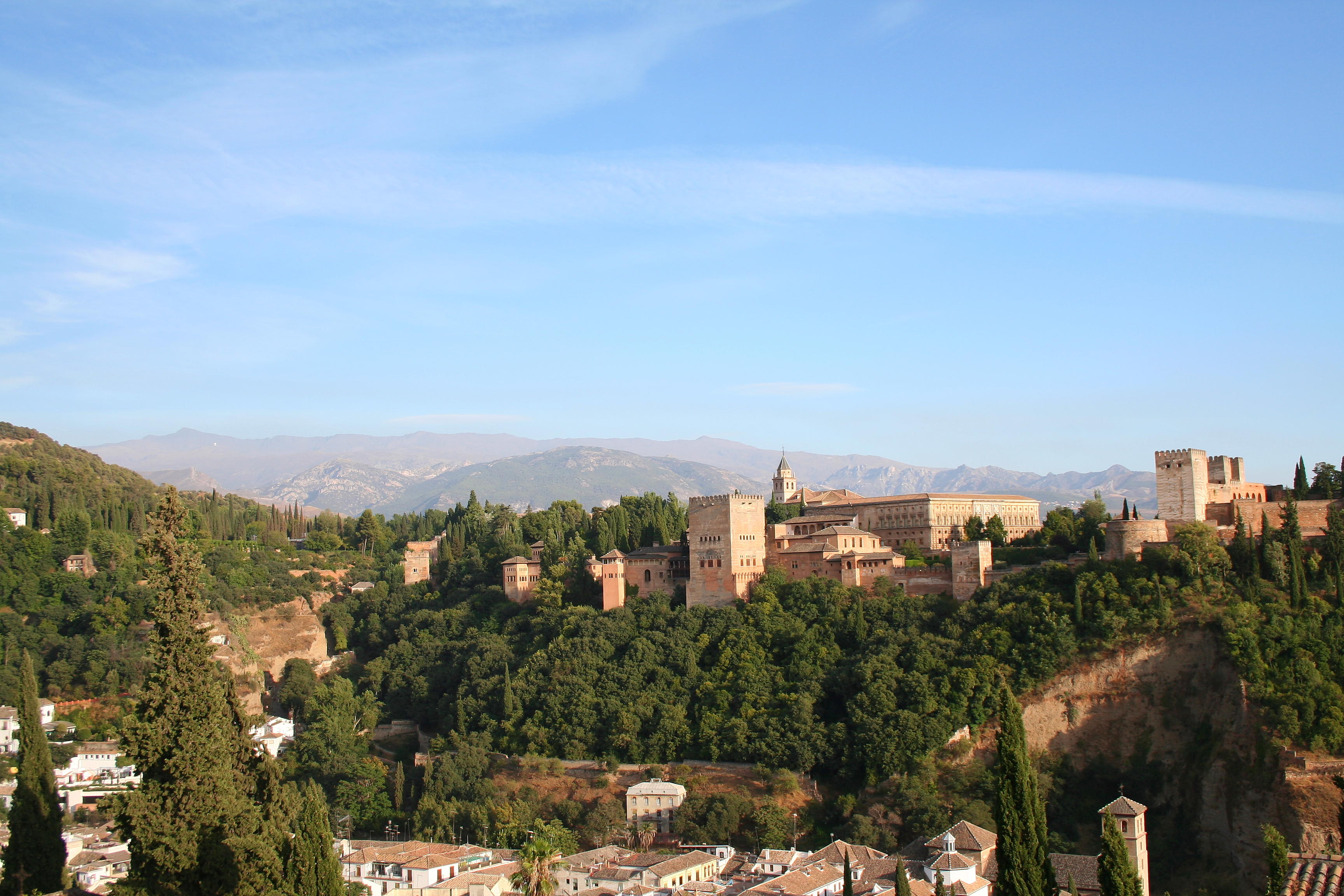 La Alhambra de Granada con Sierra Nevada de fondo. The Alhambra de Granada, Sierra Nevada